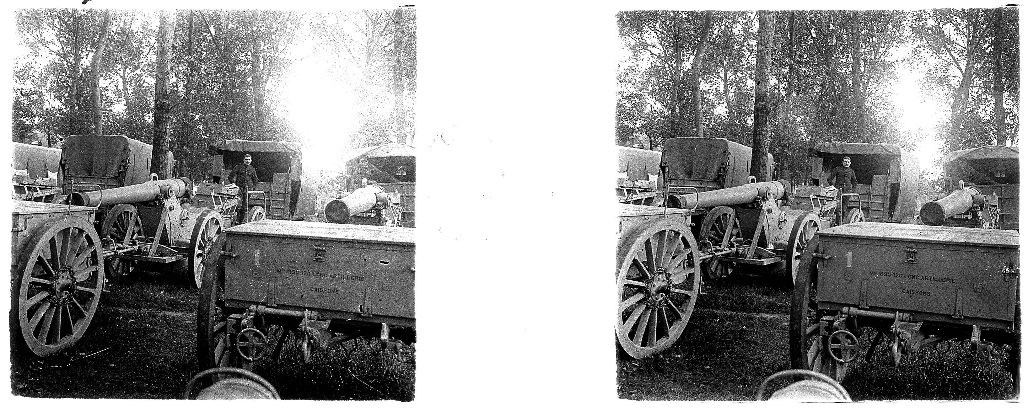 Prise de vue de deux canons de 120 long datant de 1890 et appartenant au 4e régiment d'artillerie basé à Rivery (Somme). 1915. Guerre 1914-1918.